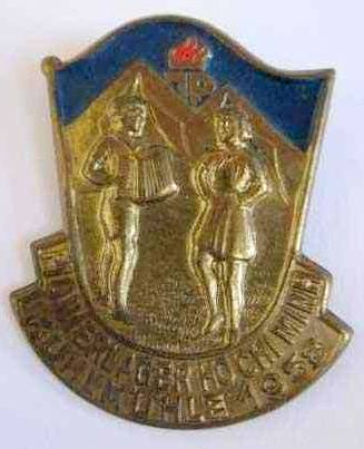 Abzeichen für Teilnehmer des Pionierlagers "Ho Chi Minh" in Kuhlmühle